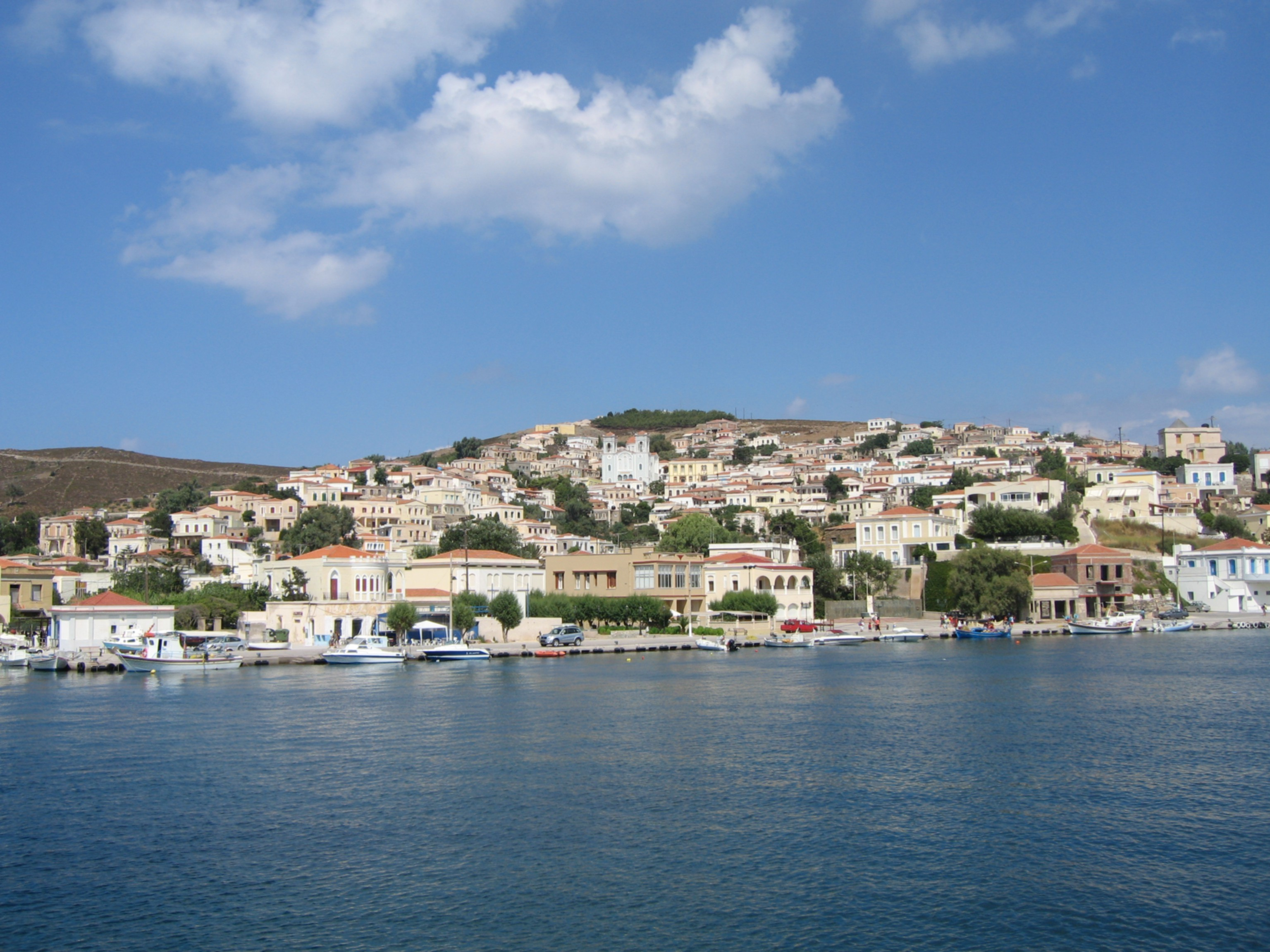 Oinousses main settlement.